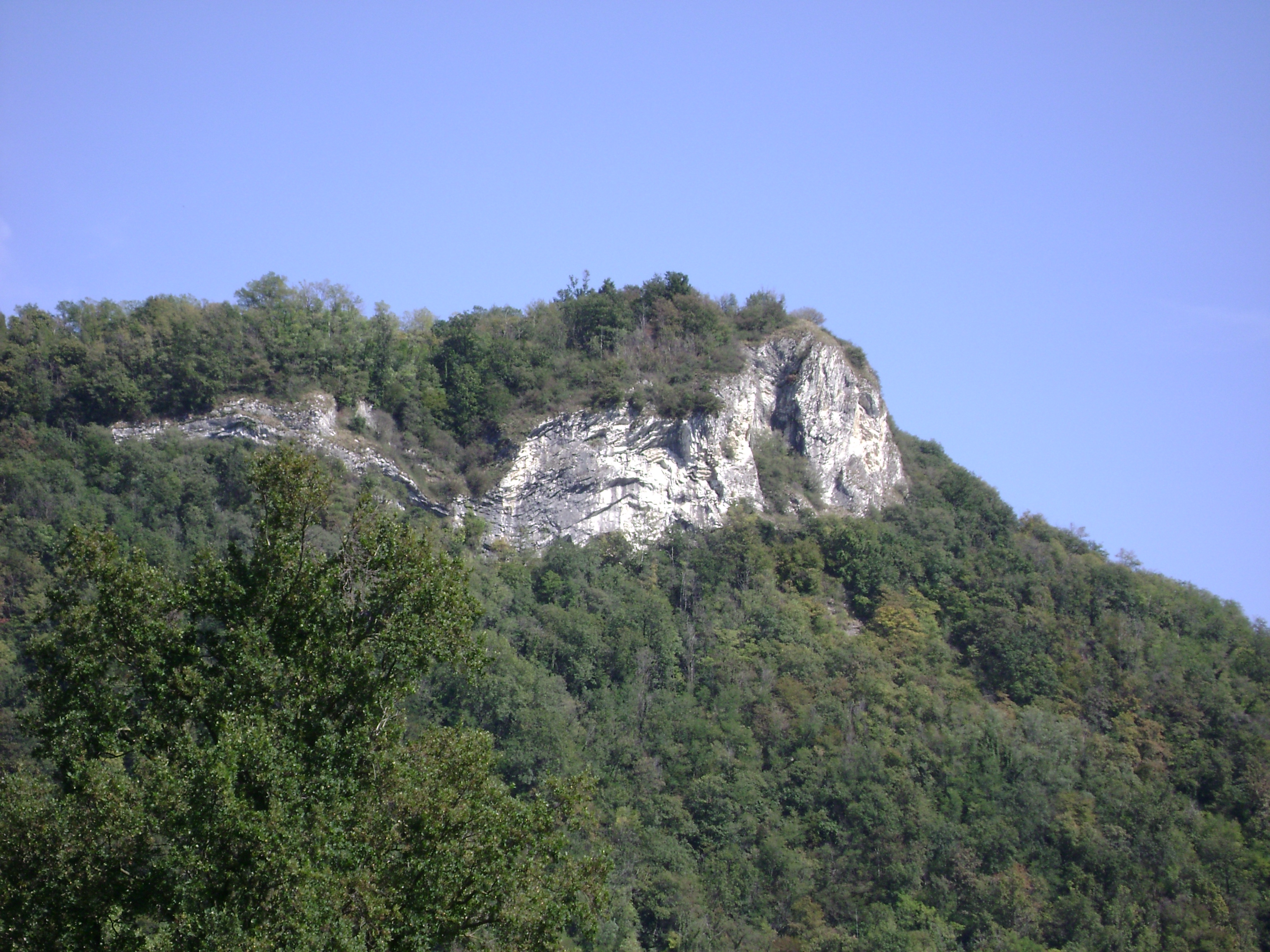 veduta del monte Picuz